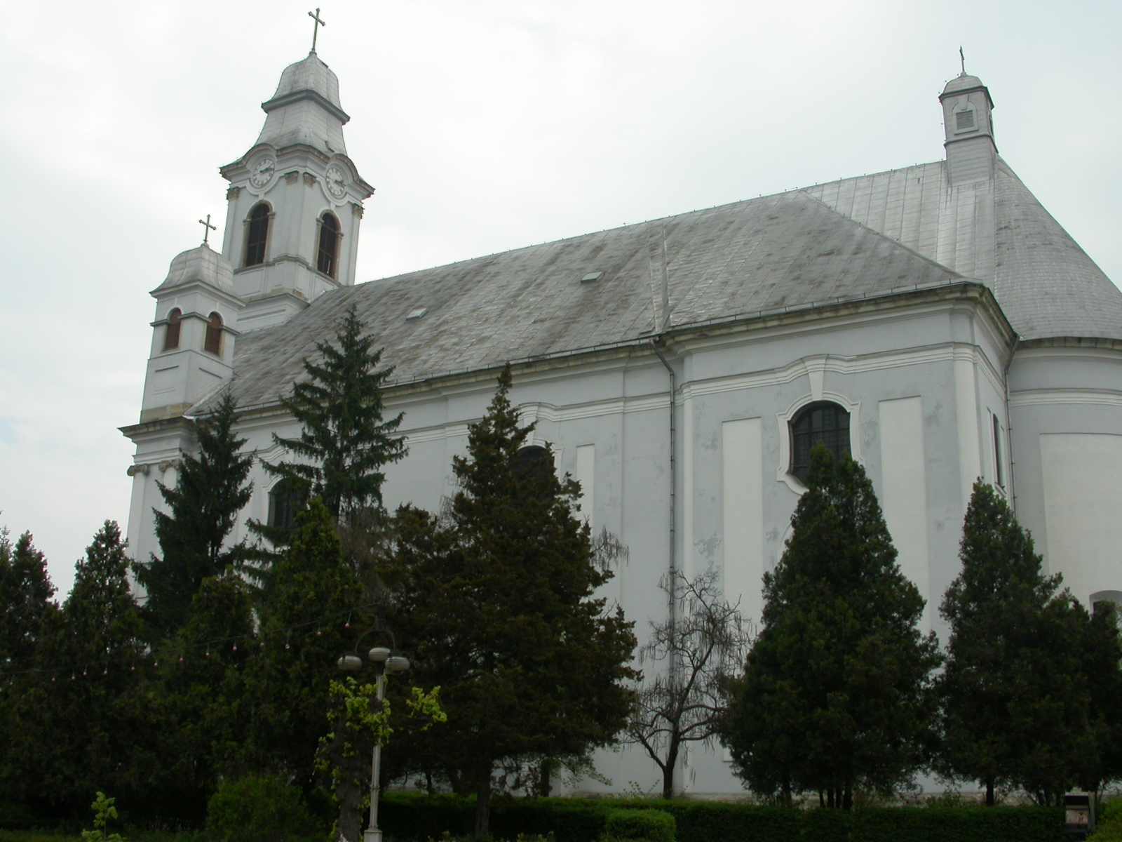 Catedrala armeano-catolică, 1748-1808